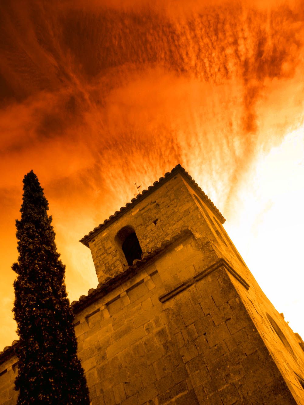 Iglesia de Santa María de Talamanca, España